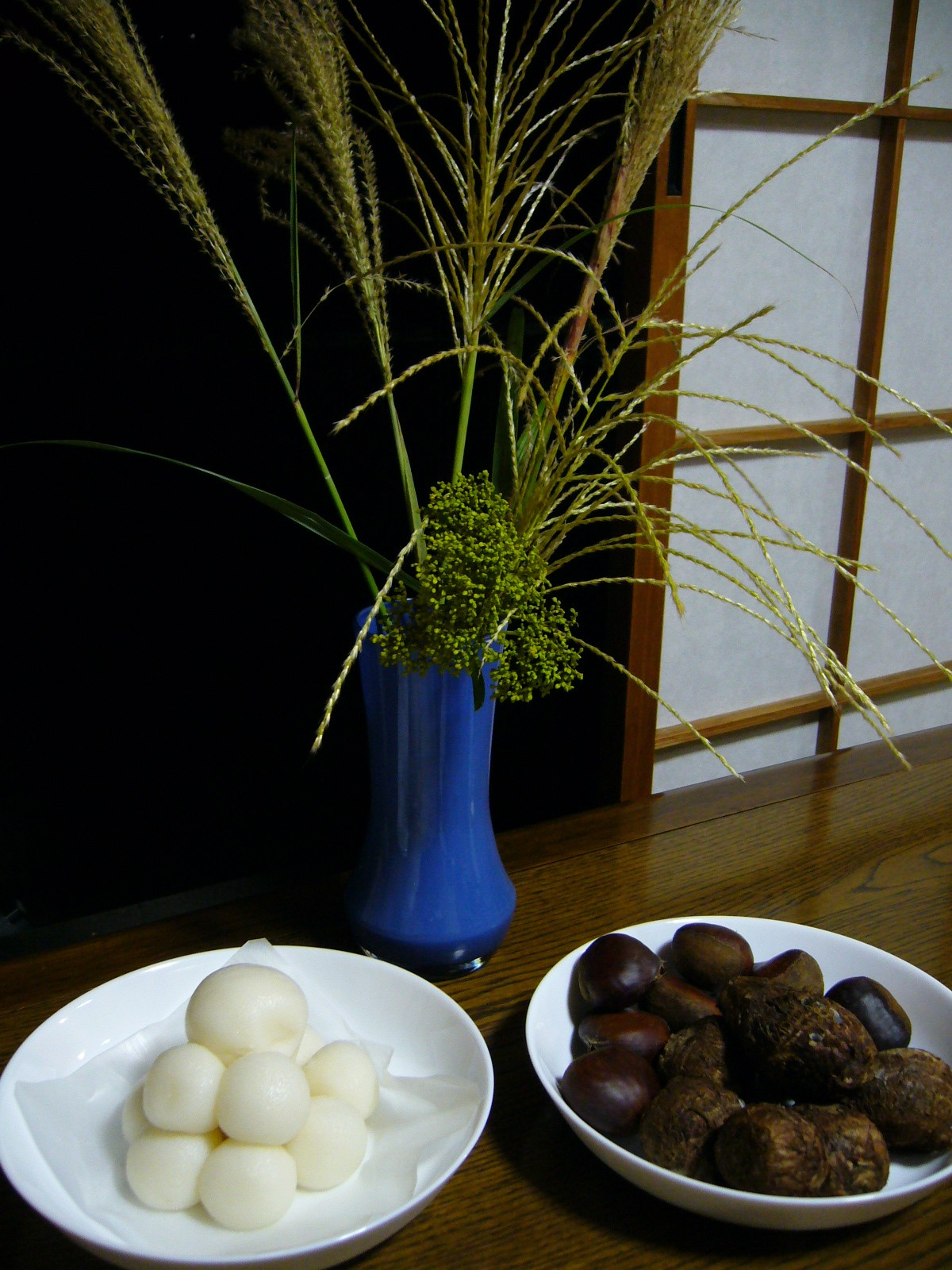 tsukimi,moon-viewing-party,dumpling & chestnut & taro & Japanese pampas grass,japan